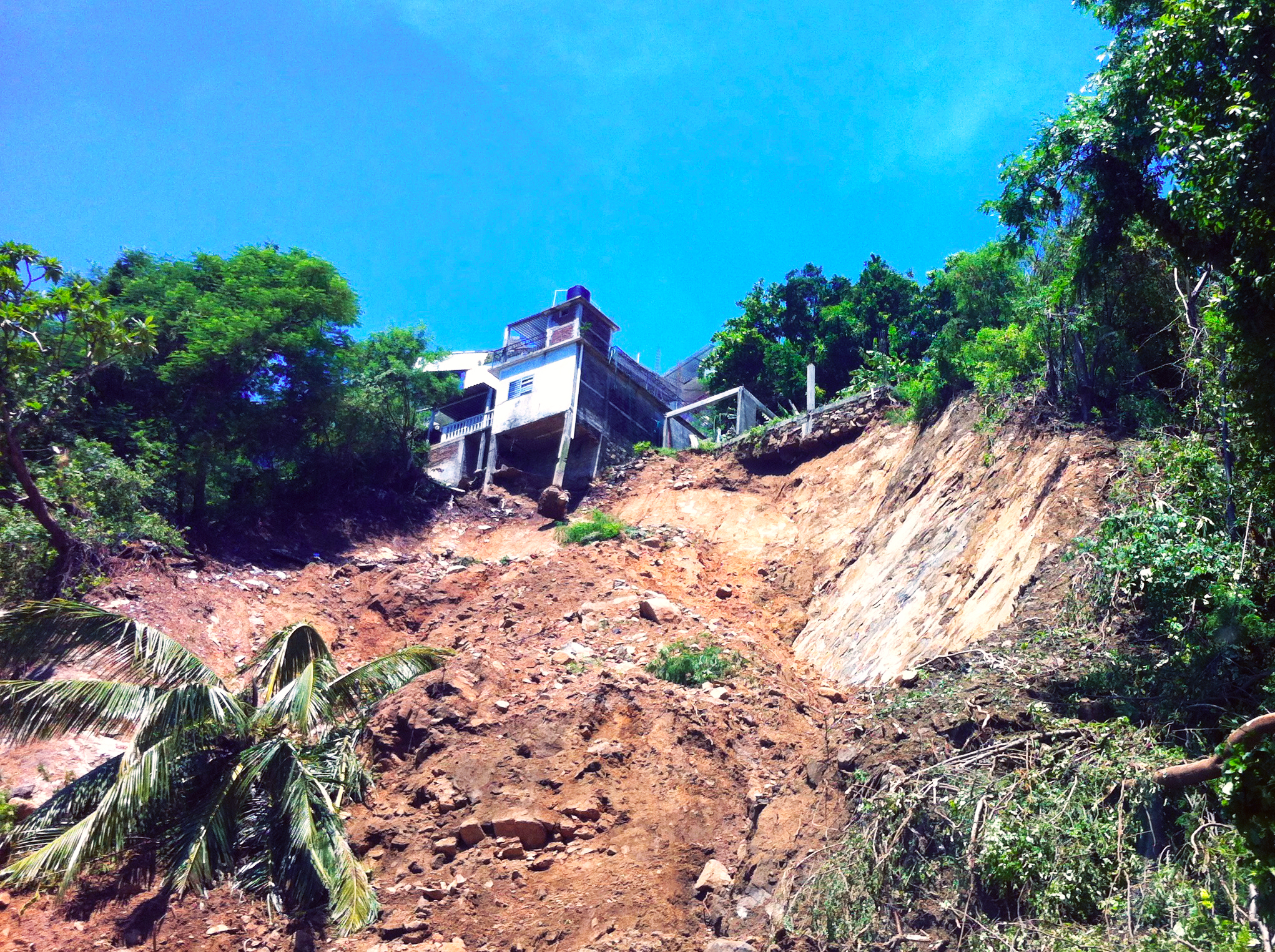 Corrimieno de tierra en la carretera Acapulco - Pie de la Cuesta, en el tramo conocido como "La Frente del Diablo", a causa de las lluvias provocadas por la Tormenta tropical Manuel.